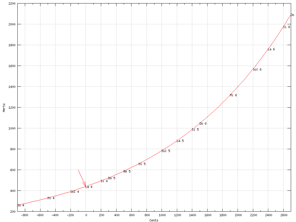 Frequency vs. Cents